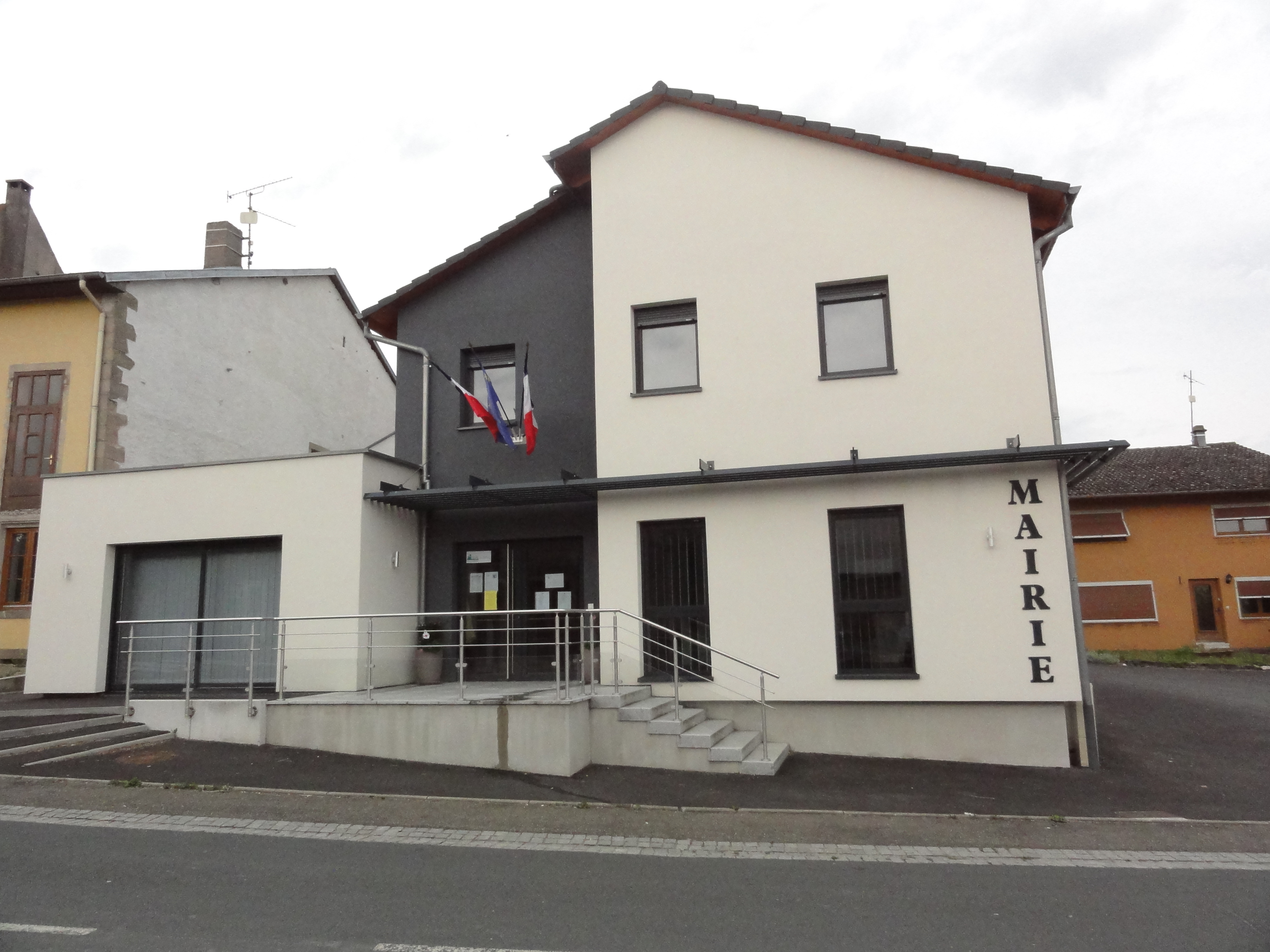 Kerprich-aux-Bois (Moselle) mairie